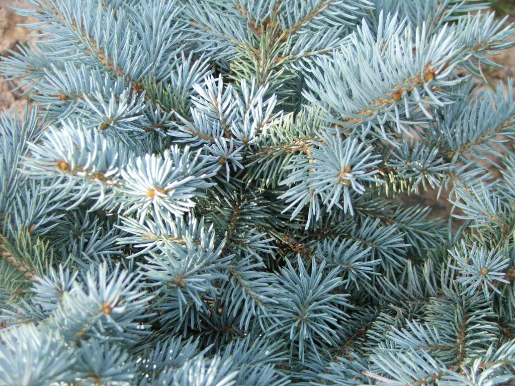 Picea pungens 'Glauca globosa' (świerk kłujący)